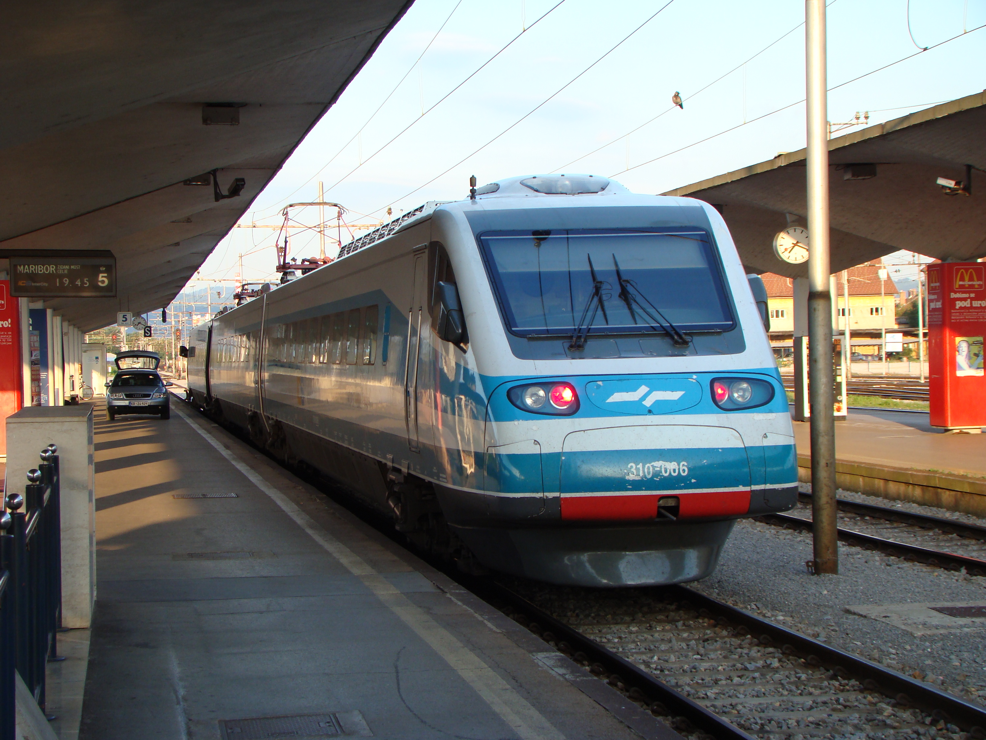 A SŽ 310 series EMU in Ljubljana, Slovenia